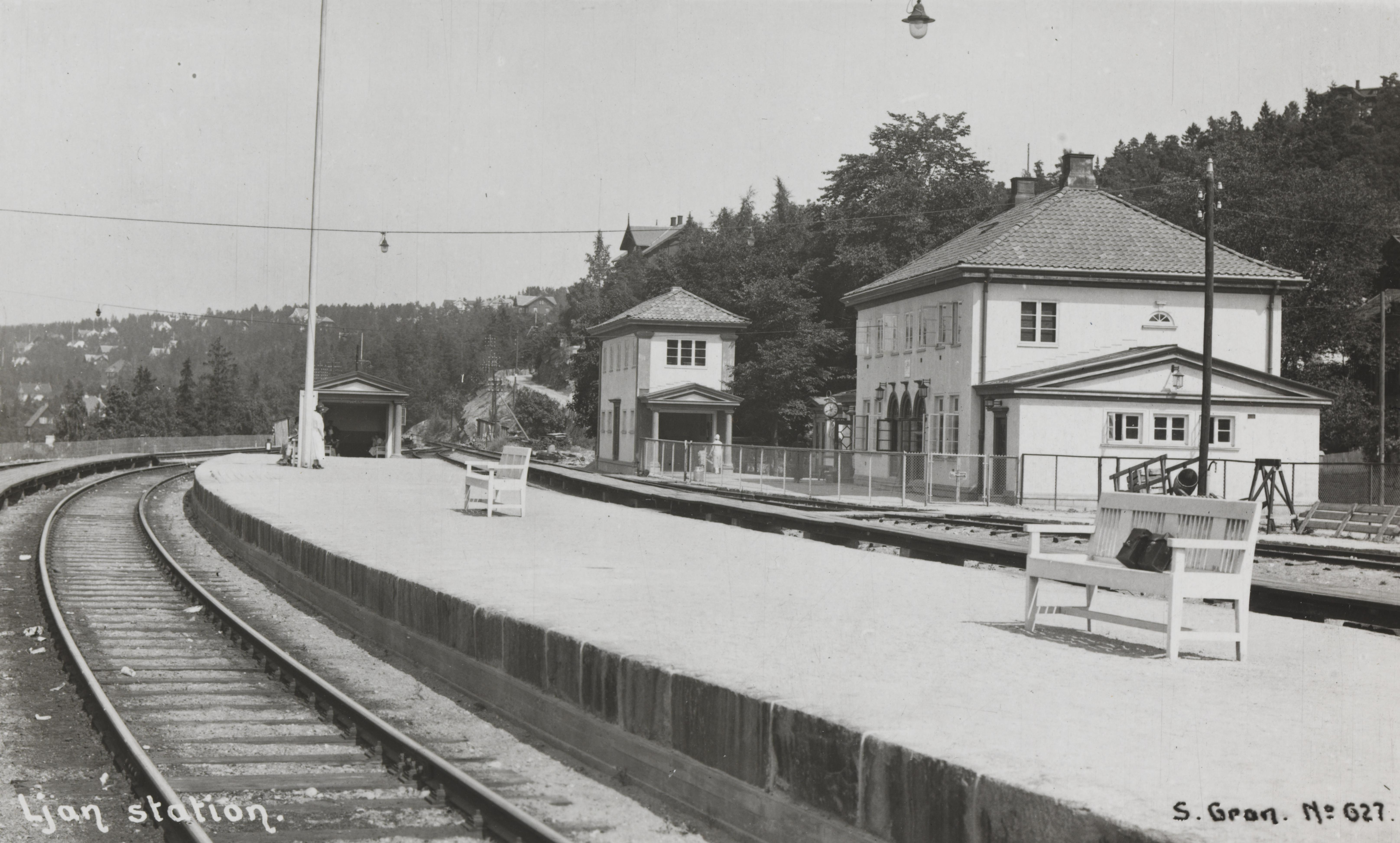 Bildet er hentet fra Nasjonalbibliotekets bildesamling Ljan,Ljan stasjon, Oslo, Oslo